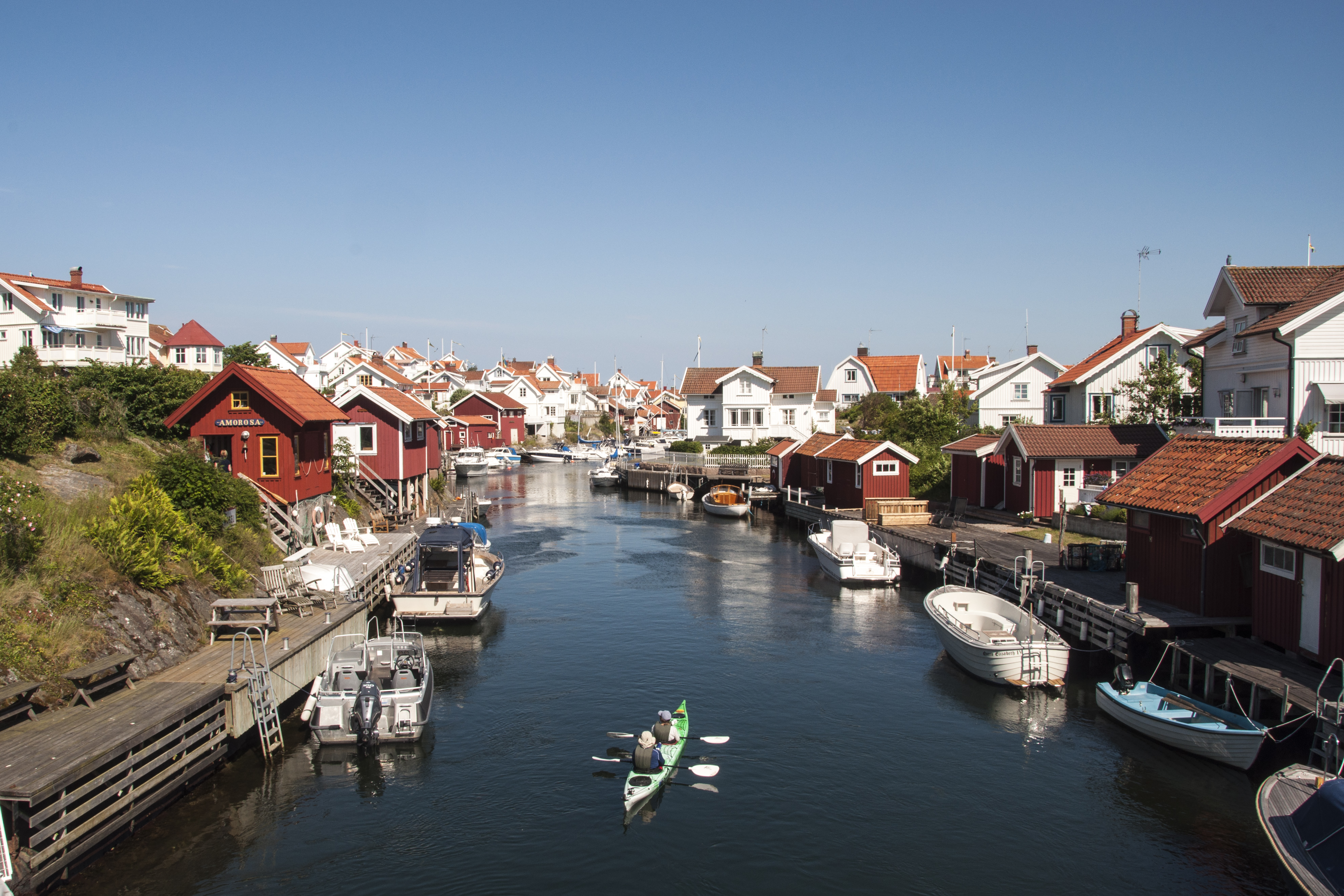 Grundsund